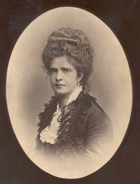 Maria Pia